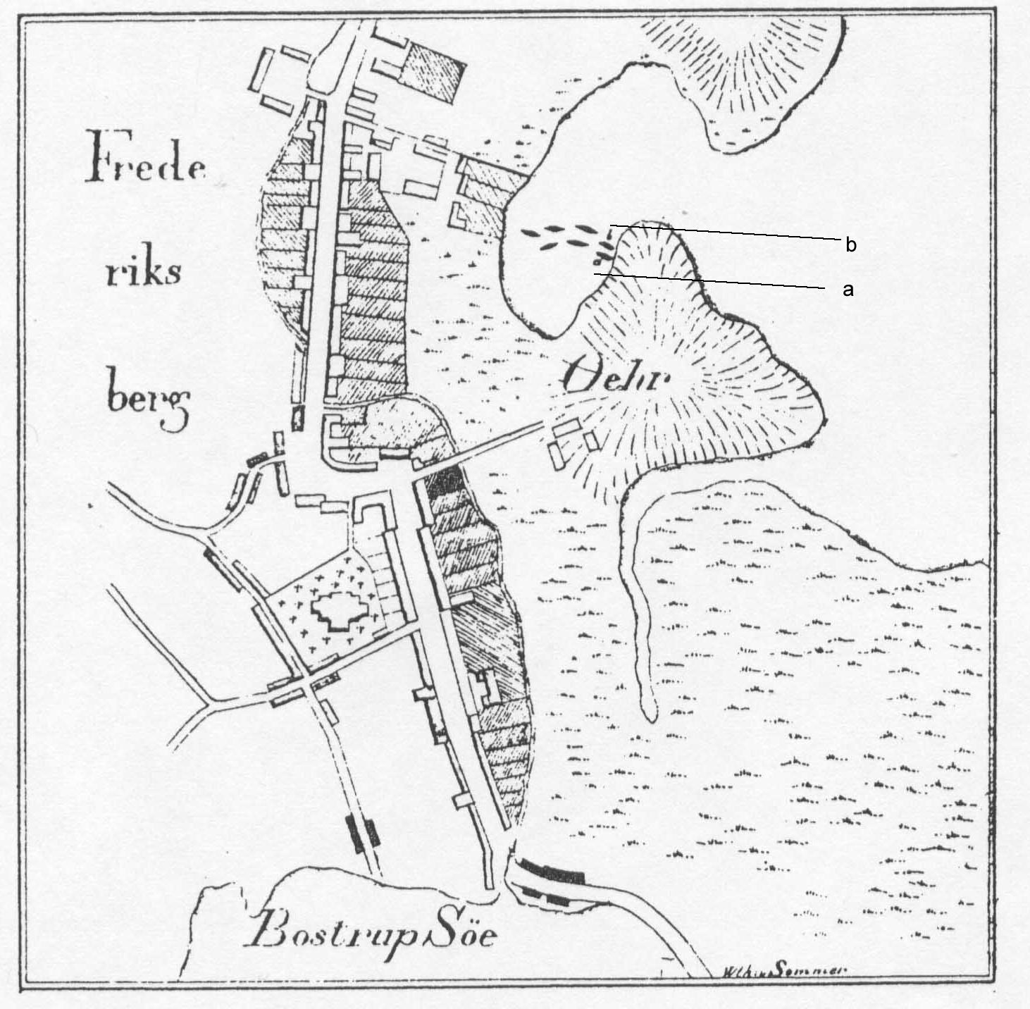 Kartierung der Wrackfunde im Schleswiger Tegelnoor